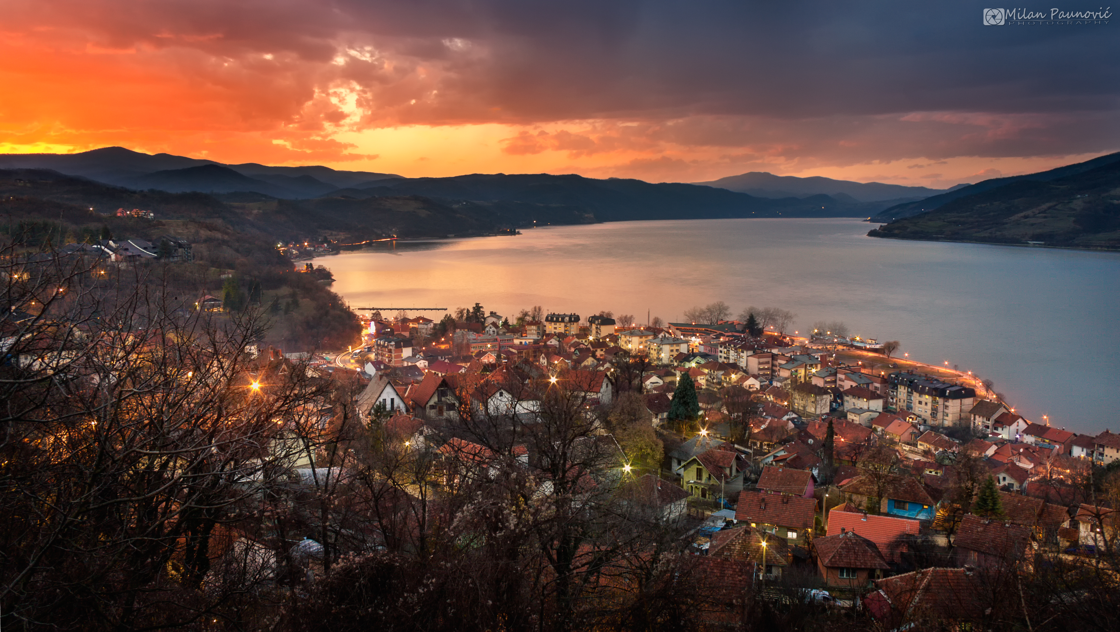 Srpski (latinica): Ово је фотографија заштићеног природног добра у Србији под шифром: НП04 This is a a photo of a natural area in Serbia with ID: НП04 Panorama Donjeg Milanovca, Nacionalni park Djerdap